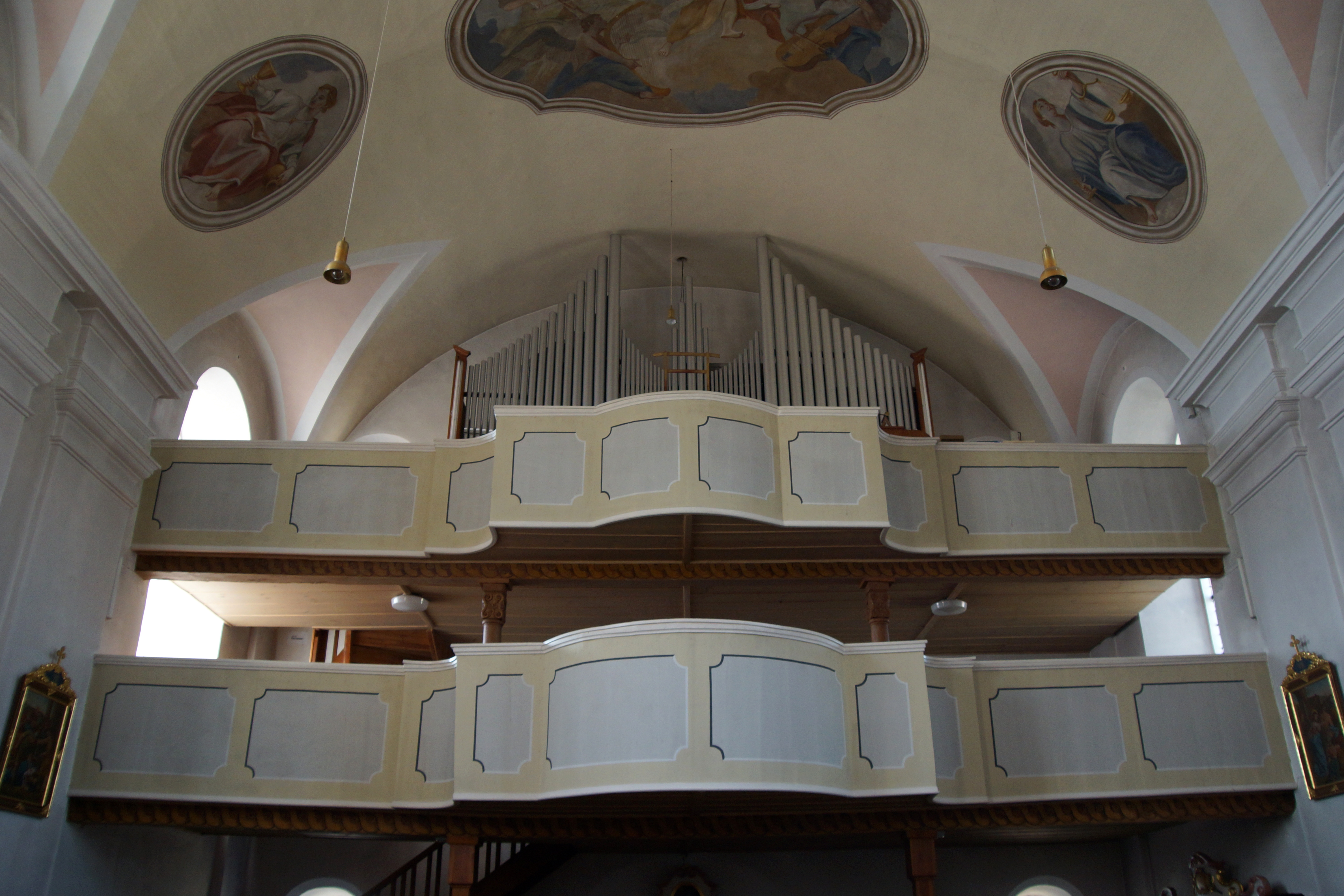 Die katholische Pfarrkirche St. Michael in Ehenfeld